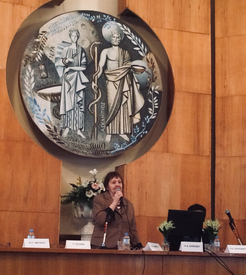 Корнева Е.А. (VII Международный симпозиум «Взаимодействие нервной и иммунной систем в норме и патологии», 27-31 мая, 2019 год).